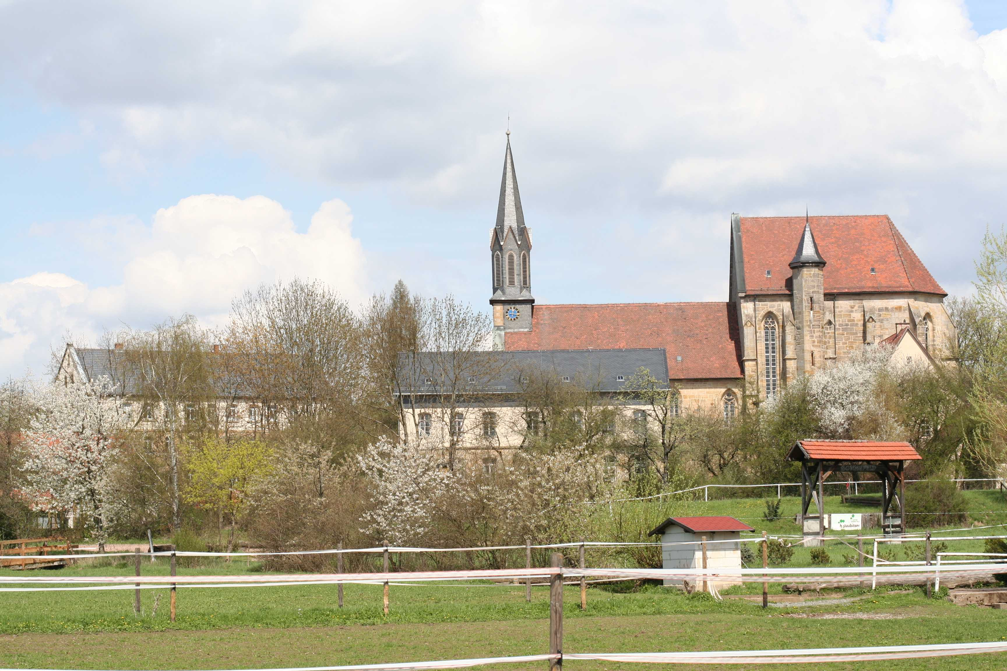 Klosterkirche SonnfeldKlosterkirche Sonnfeld im Landkreis Coburg